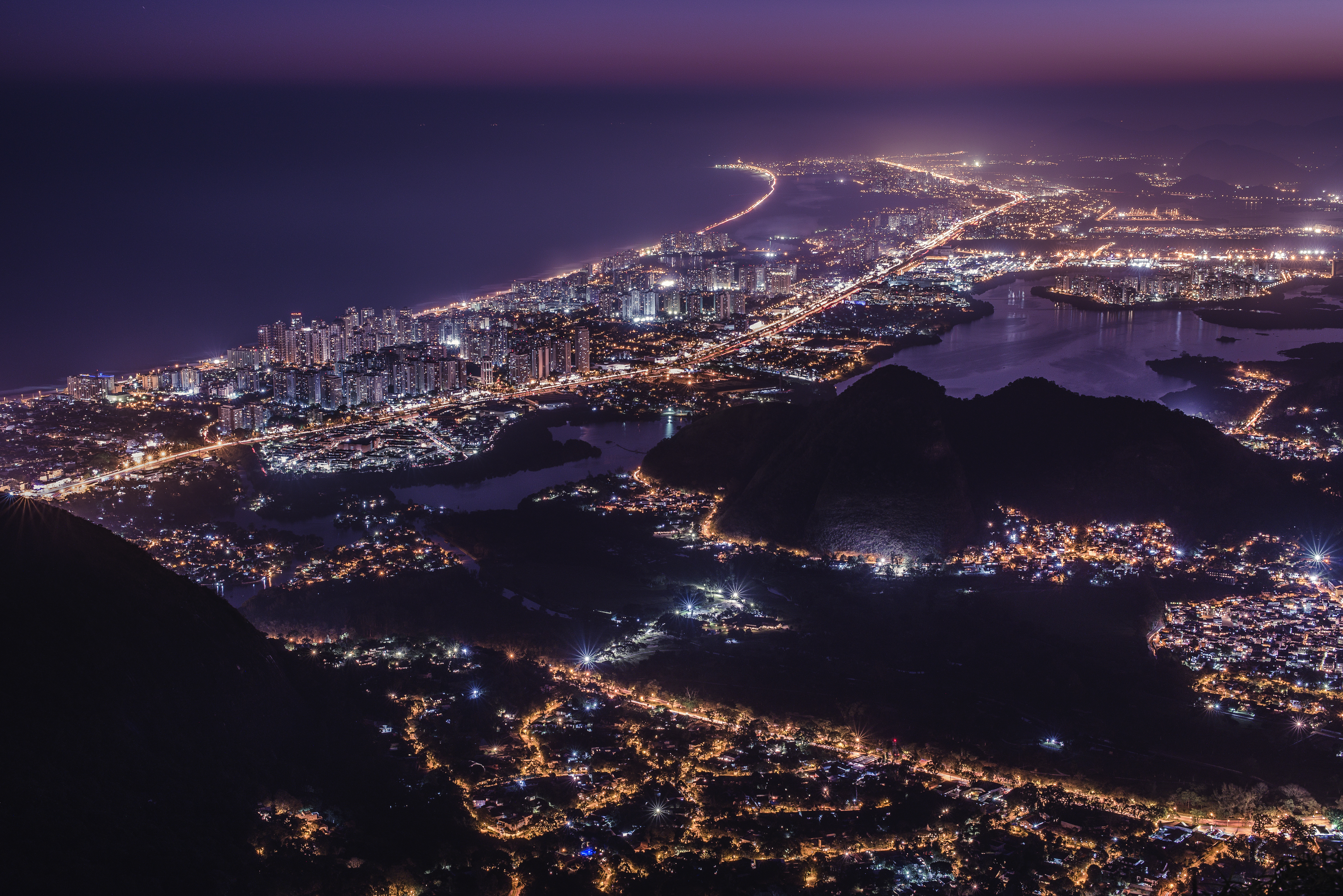 Vista possível do topo da Pedra Bonita, 693m, situado dentro do Parque Nacional da Tijuca que abriga a maior floresta urbana do mundo.